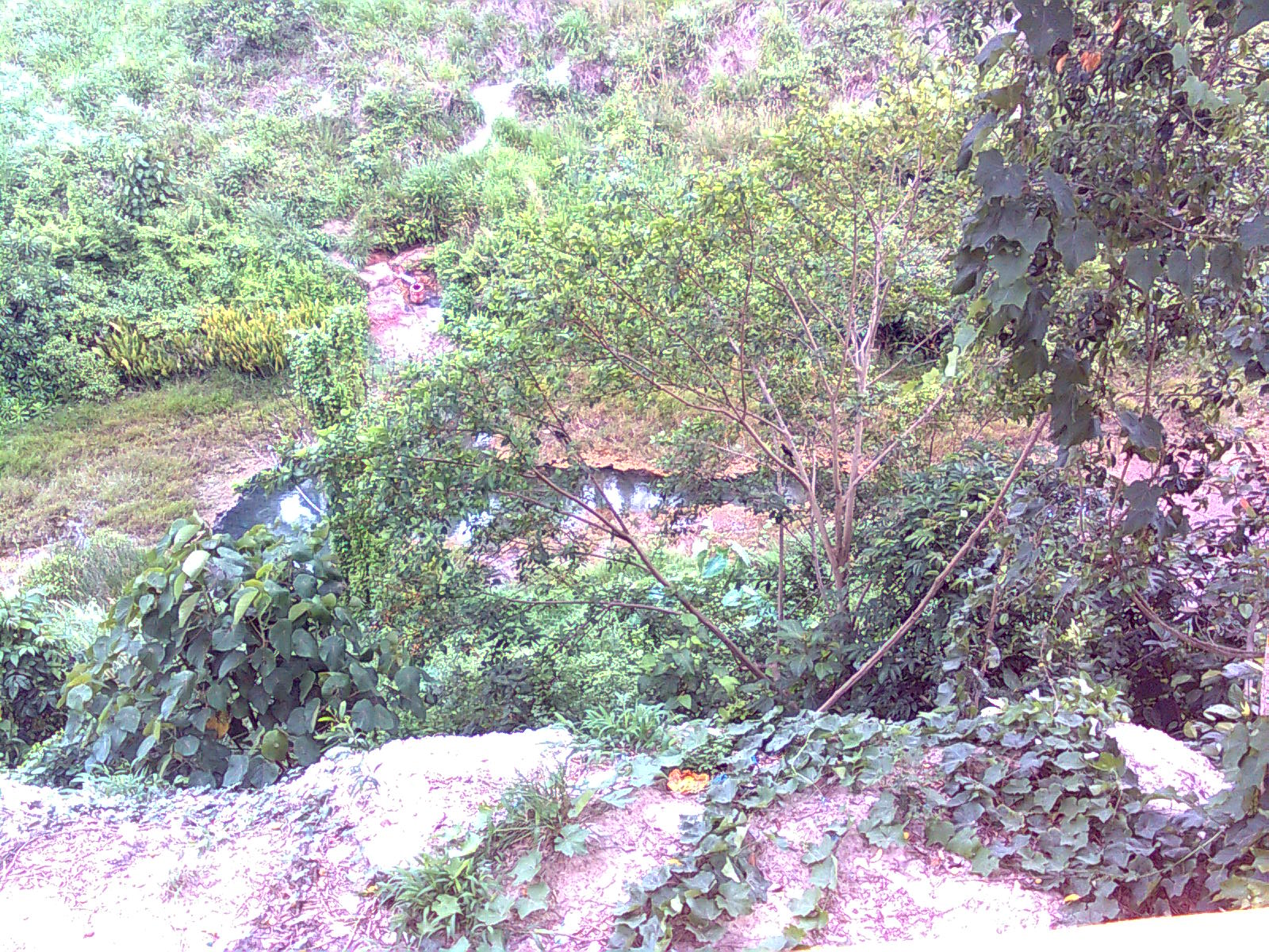 റ്റീ എസ് കനാൽ ,ശിവഗിരിയുടെ അടുത്ത്